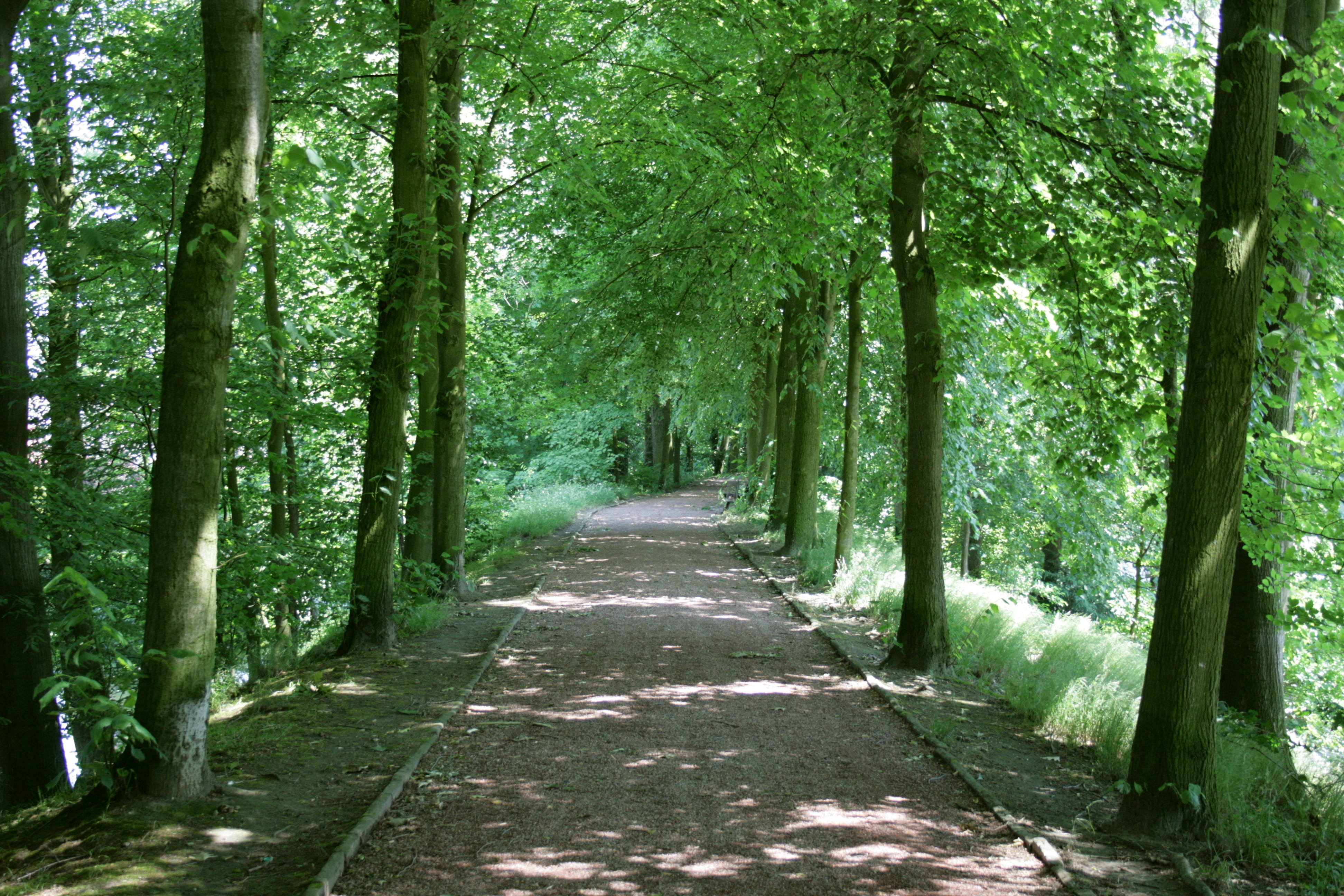 Anholter Stadtwall in Isselburg